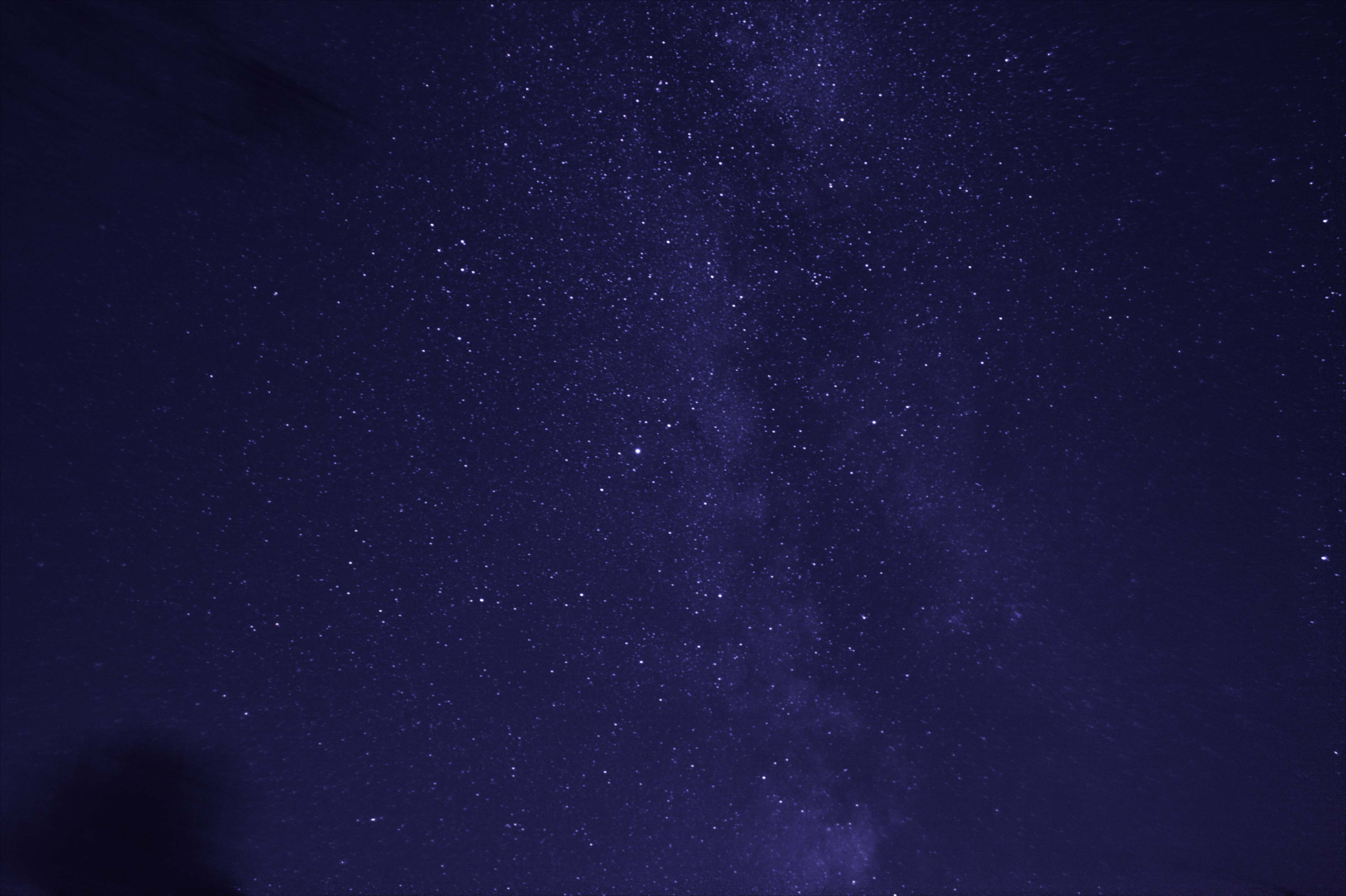 Sternenkonstellation im Vordergrund der Milchstrasse